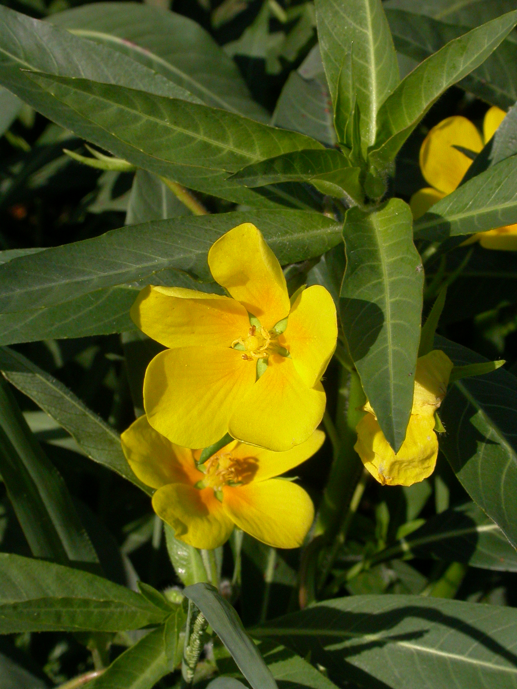 Ludwigia grandiflora subsp. hexapetala Saint-Mathurin-sur-Loire (Maine-et-Loire), France